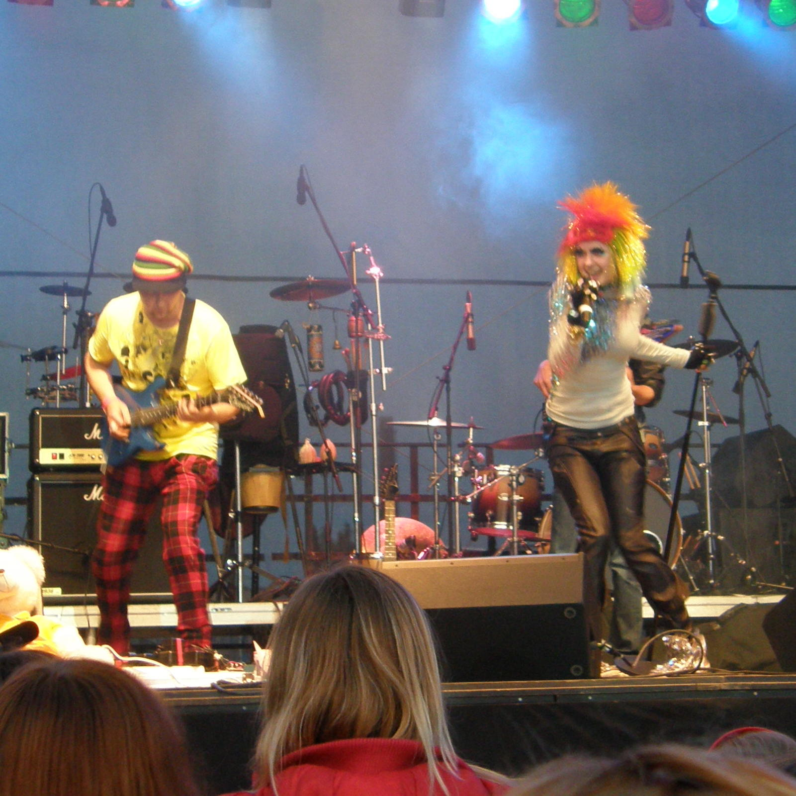 Grupa Triānas Parks uzstājas Jēkabpils pilsētas svētkos 2009. gadā